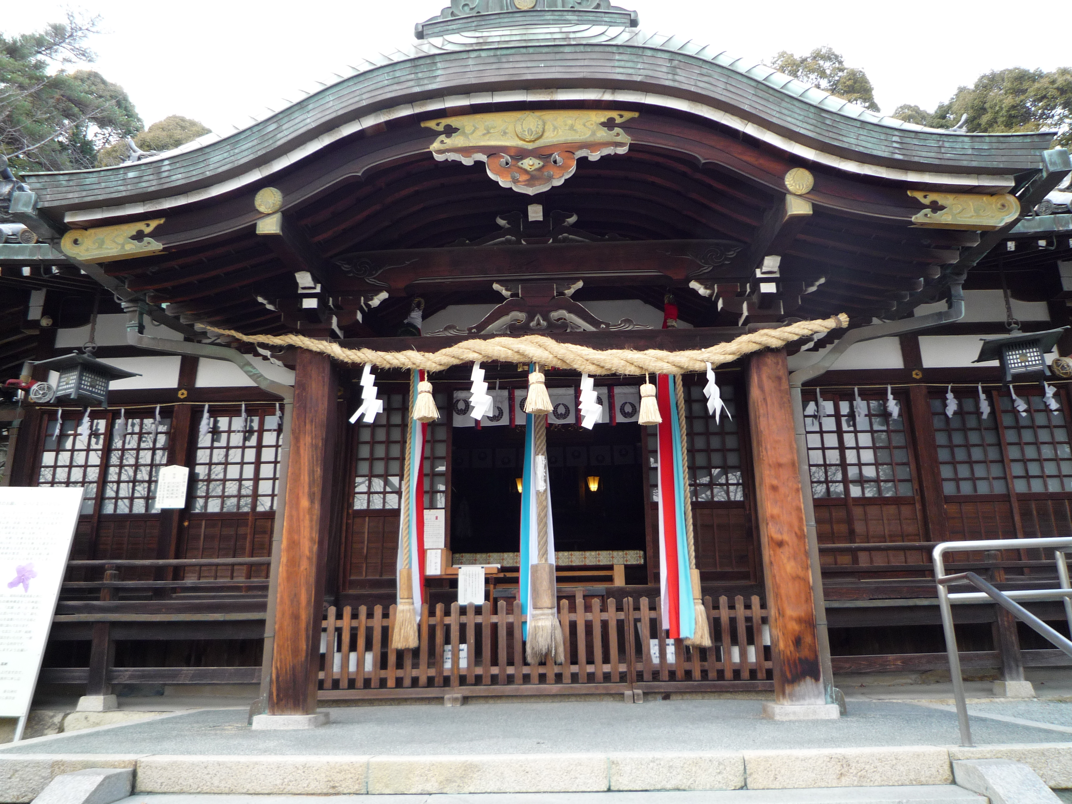 春日神社の社殿